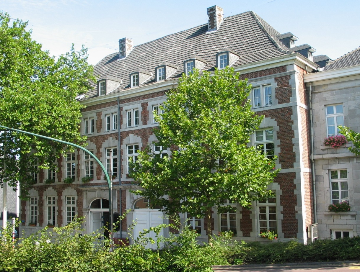 Ehemaliges Kaufmannshaus in Eupen, Kaperberg 2-4. Architekt; Mefferdatis. Seit 1989 Staatsarchiv.